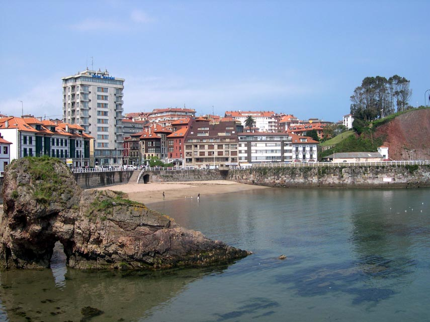 candas candás puerto